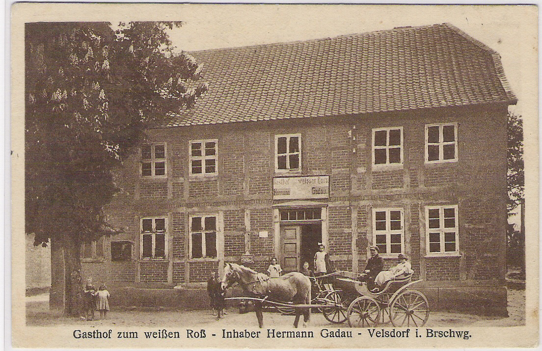 Postkarte aus Velsdorf 1925 gestempelt